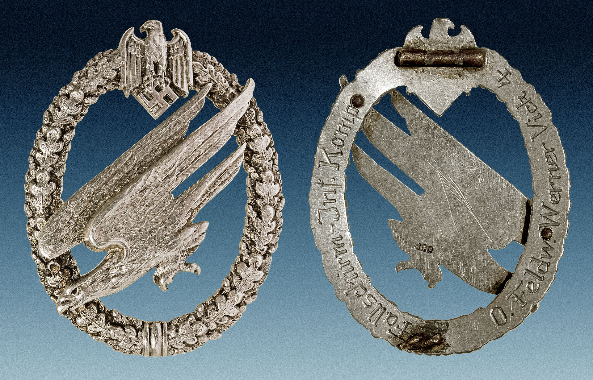 Fallschirmtruppe der Luftwaffe 1936-1945, hier Fallschirmschützenabzeichen für Fallschirmjäger (Oberfeldwebel Werner Vick, 4. Fallschirm-Infanterie-Kompanie).